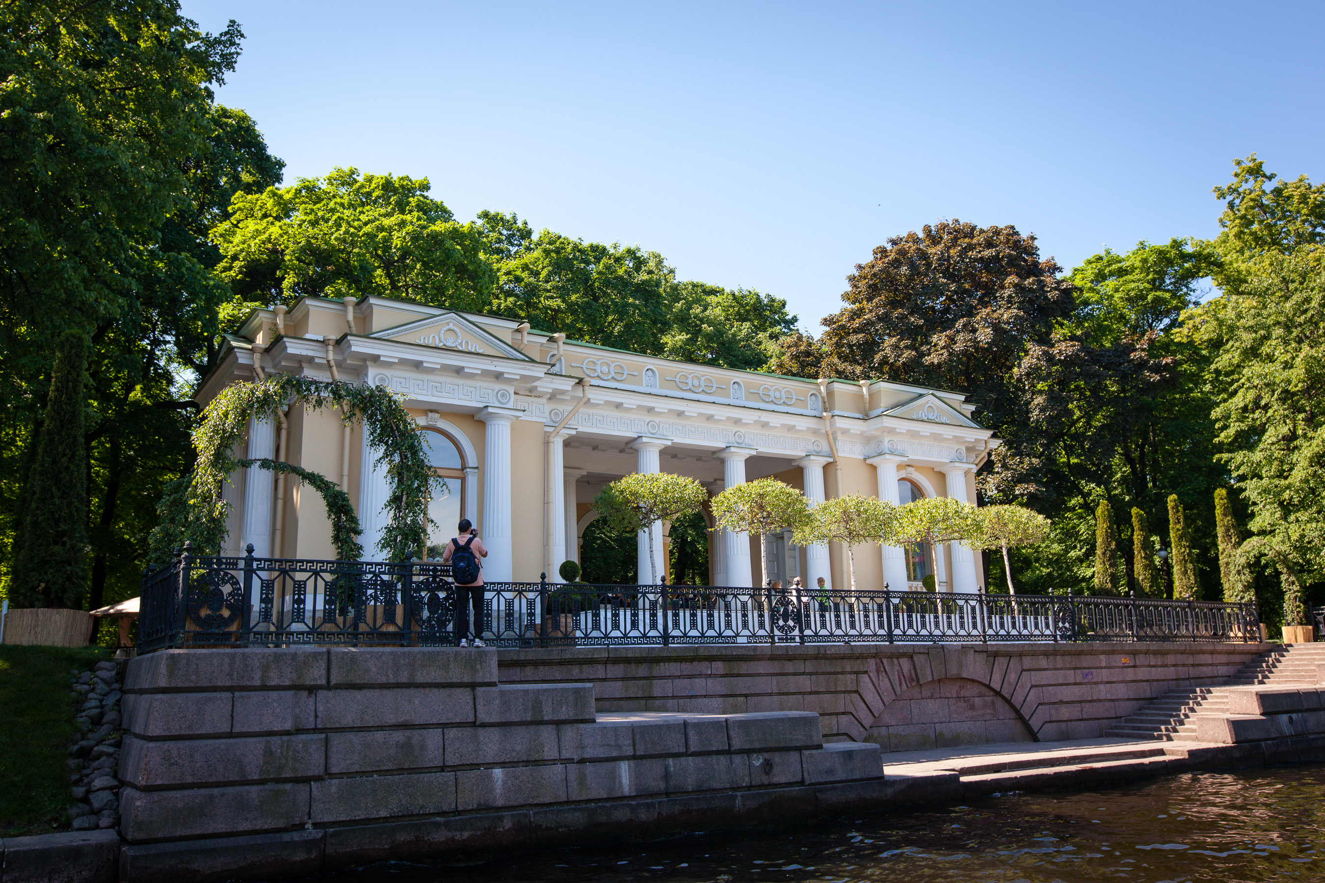 St. Petersburg